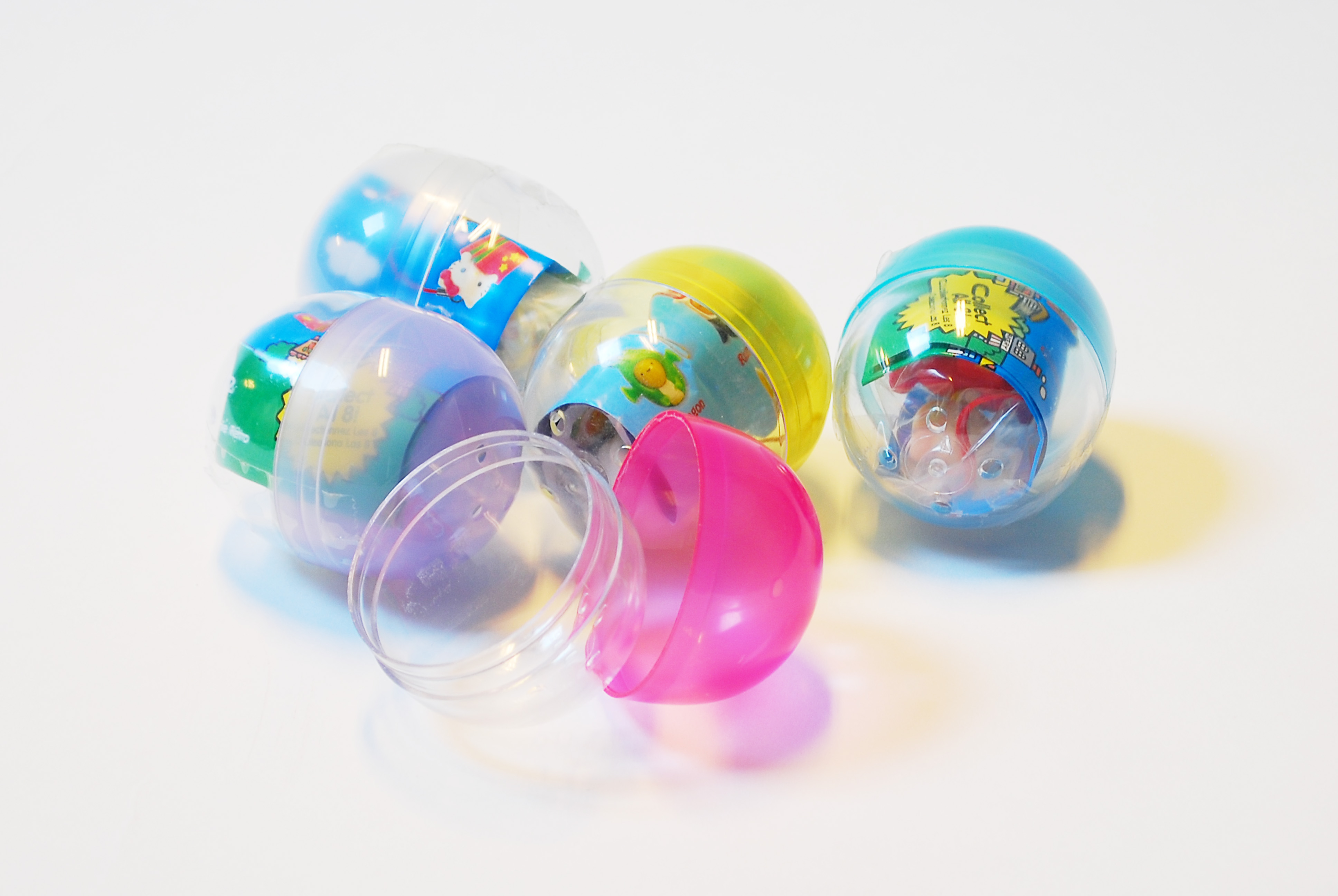 Gachapon capsules.